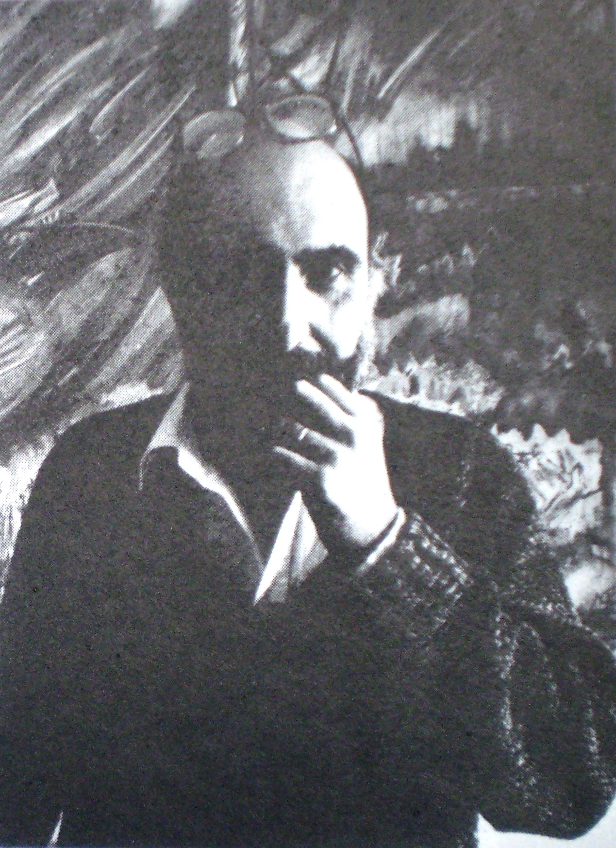 Luis Felipe Noé